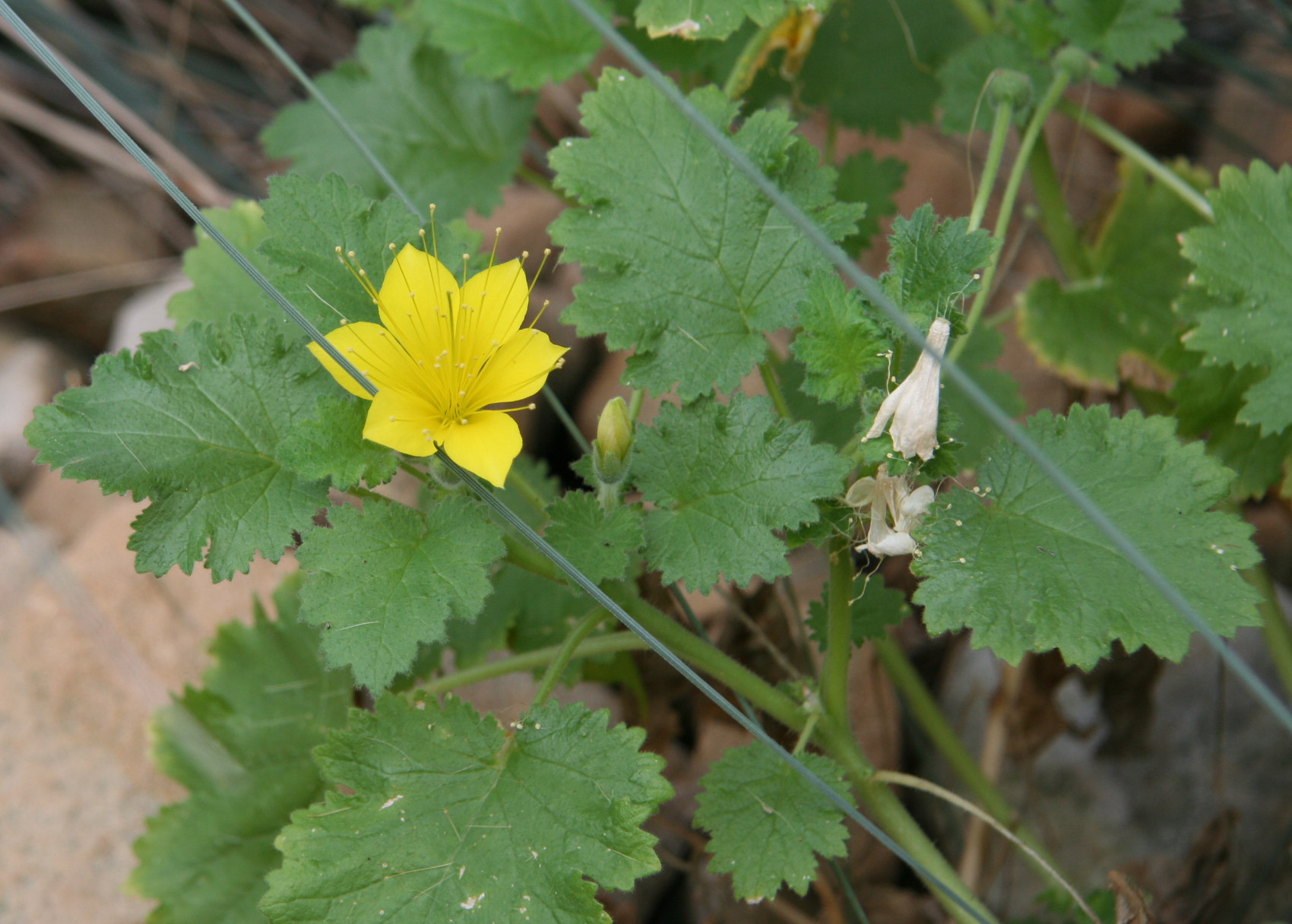 Eucnide bartonioides im Botanischen Garten Dresden